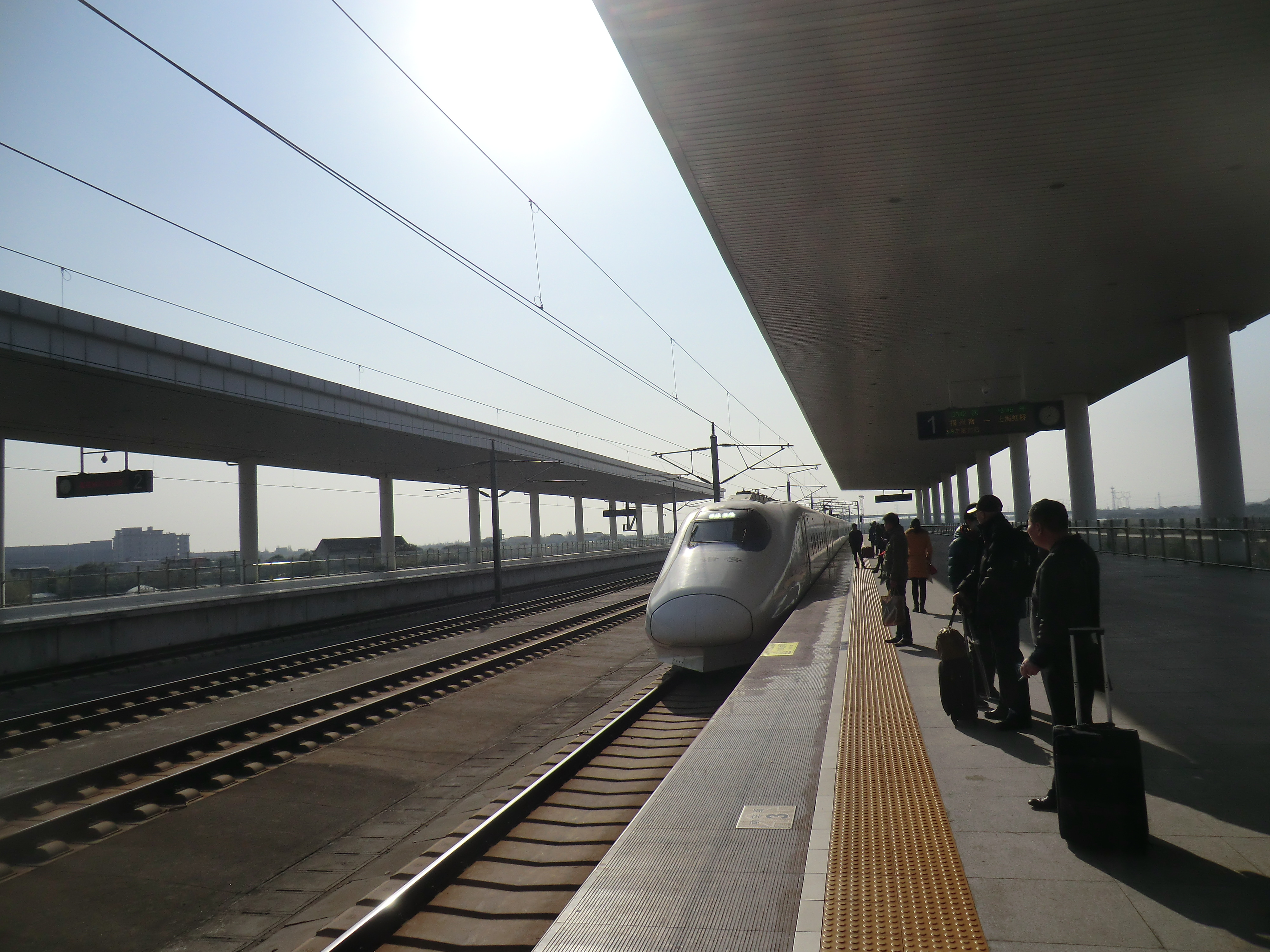 CRH2A停靠嘉善南站